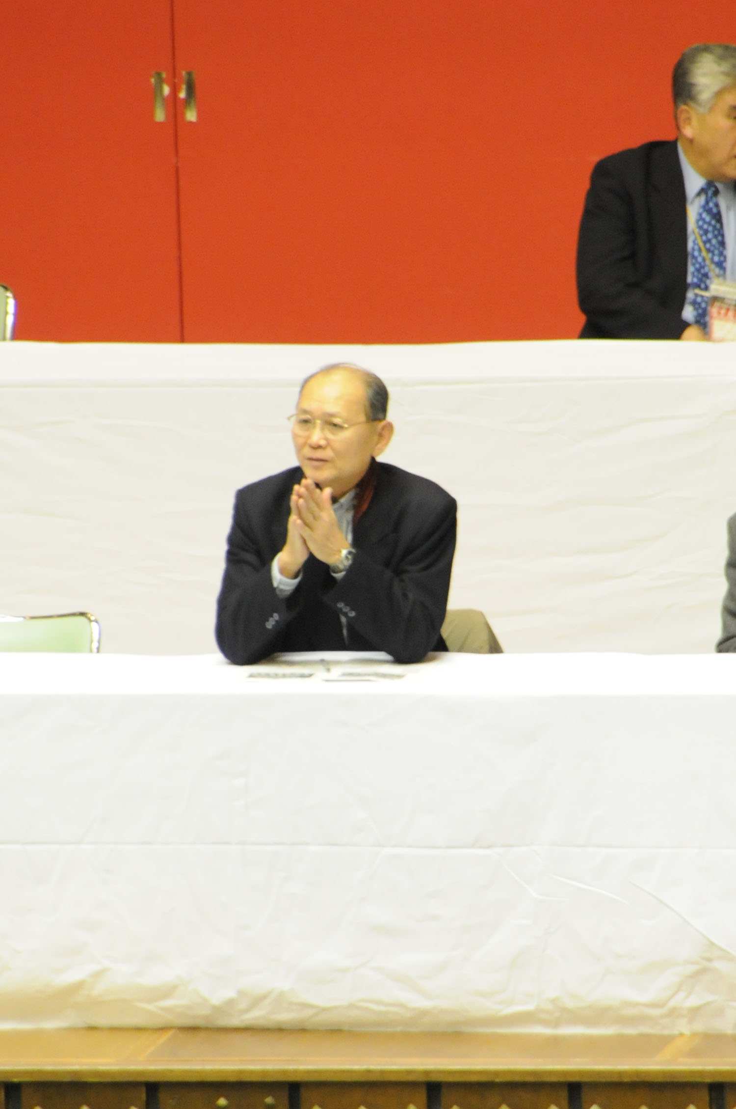 加藤廣志 能代工業元監督。秋田県立体育館で。